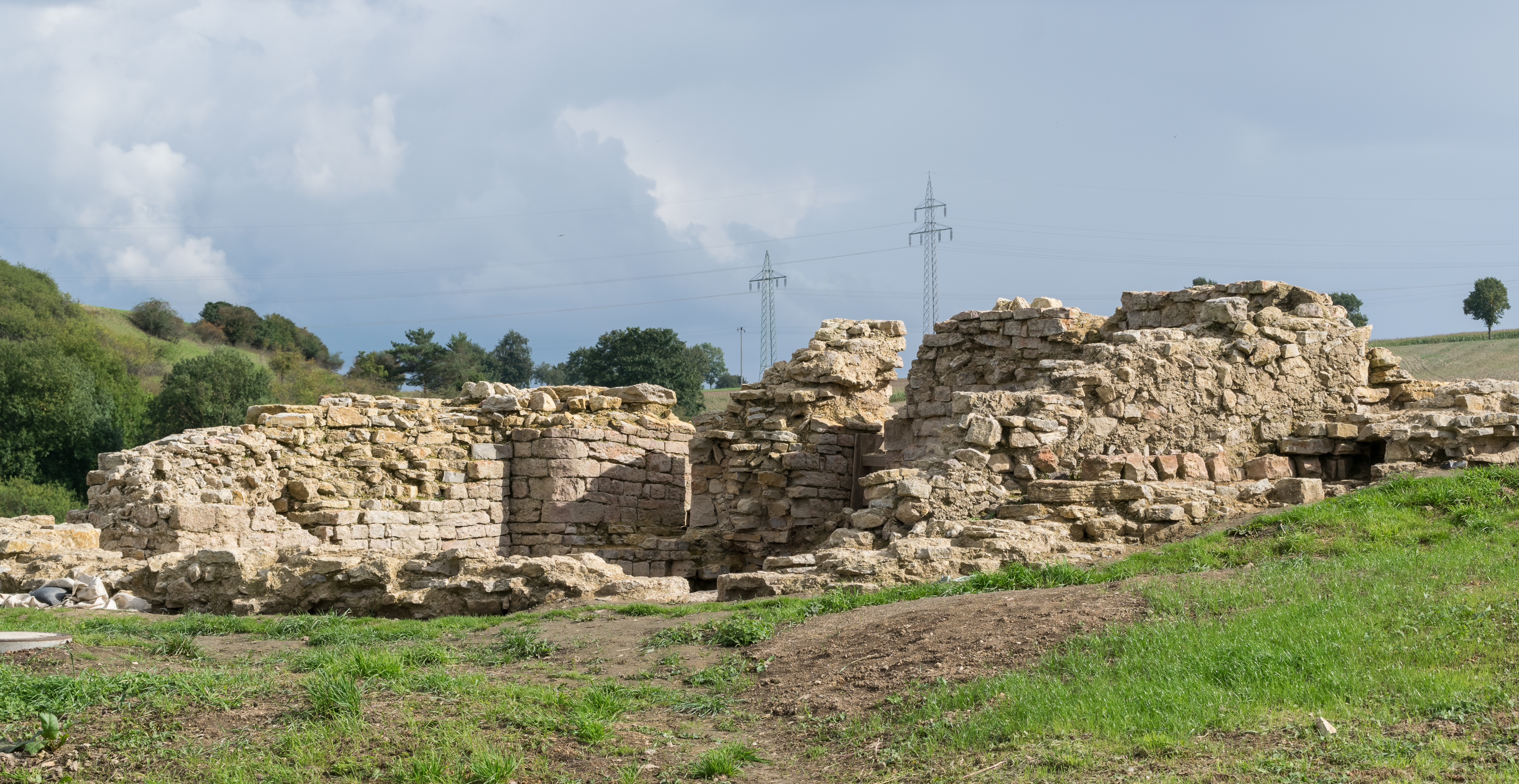 Ausgrabungen an der 1294 zerstörten Niederungsburg Holsterburg bei Warburg